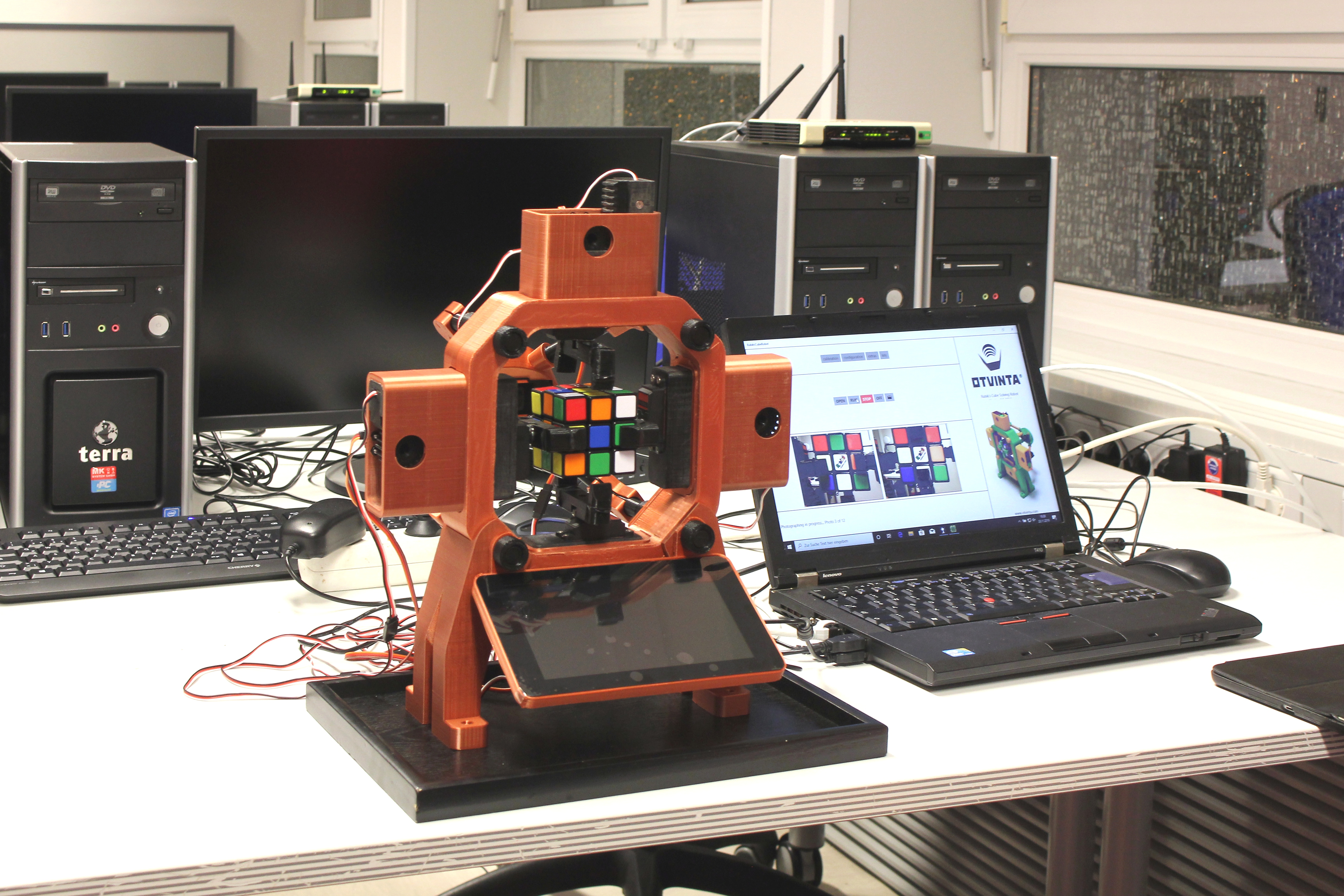 Roboter zur Lösung des Zauberwürfels, zusammen mit ihrem Lehrer gebaut von Schülern der Dr. Zimmermannschen Wirtschaftsschule in Koblenz. Die tragenden Teile wurden im schuleigenen 3D-Drucker hergestellt. Ende November, als das Foto entstand, war die Apparatur noch in der Erprobungsphase und fand die Lösung langsamer als ein schneller „Zauberwürfler“.